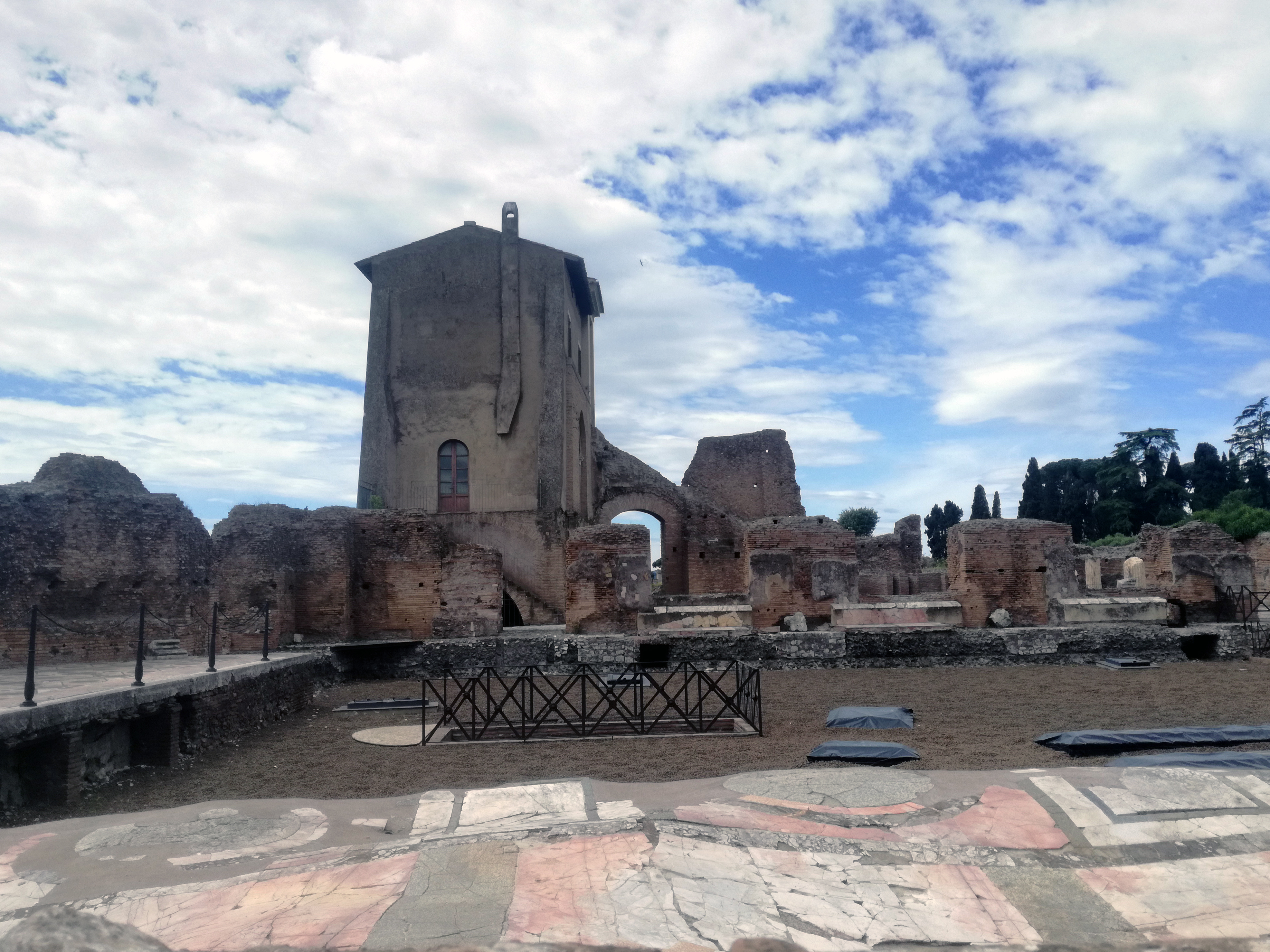 Cenatio iovis e casina farnese nei fori imperiali di Roma